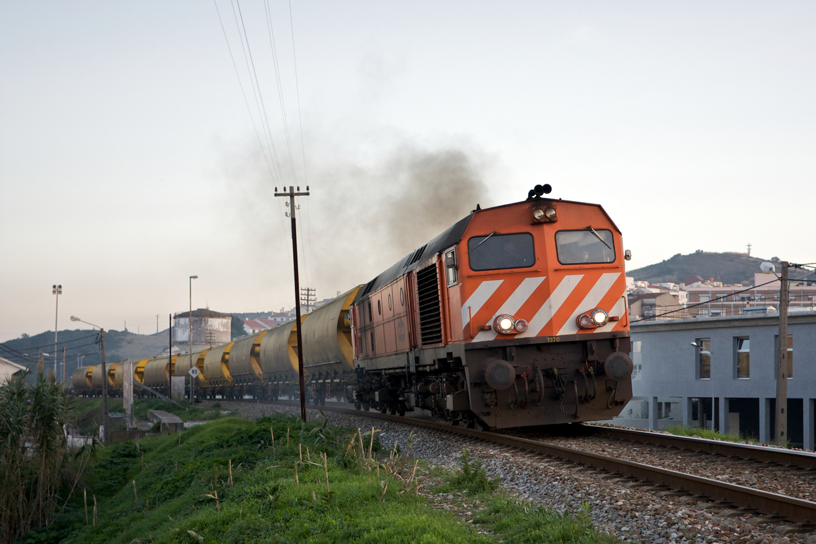 Tipo: Comboio de Distribuição 75332 [Bobadela - Pampilhosa] Local: Torres Vedras [Linha do Oeste, PK 64] Data e hora: 14 de Dezembro de 2010 [16h58] Material: Locomotiva 1970 + 12 vagões (9 CP Tadgs e 3 CP Rlps)